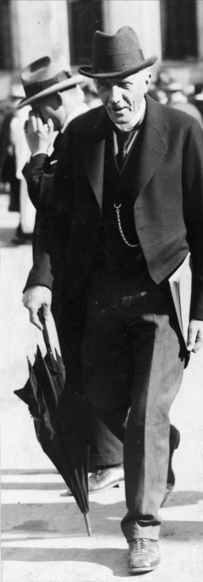 Axel Holst (født 6. september 1860 i Christiania, død 26. april 1931 samme sted) var en norsk lege og professor i medisin